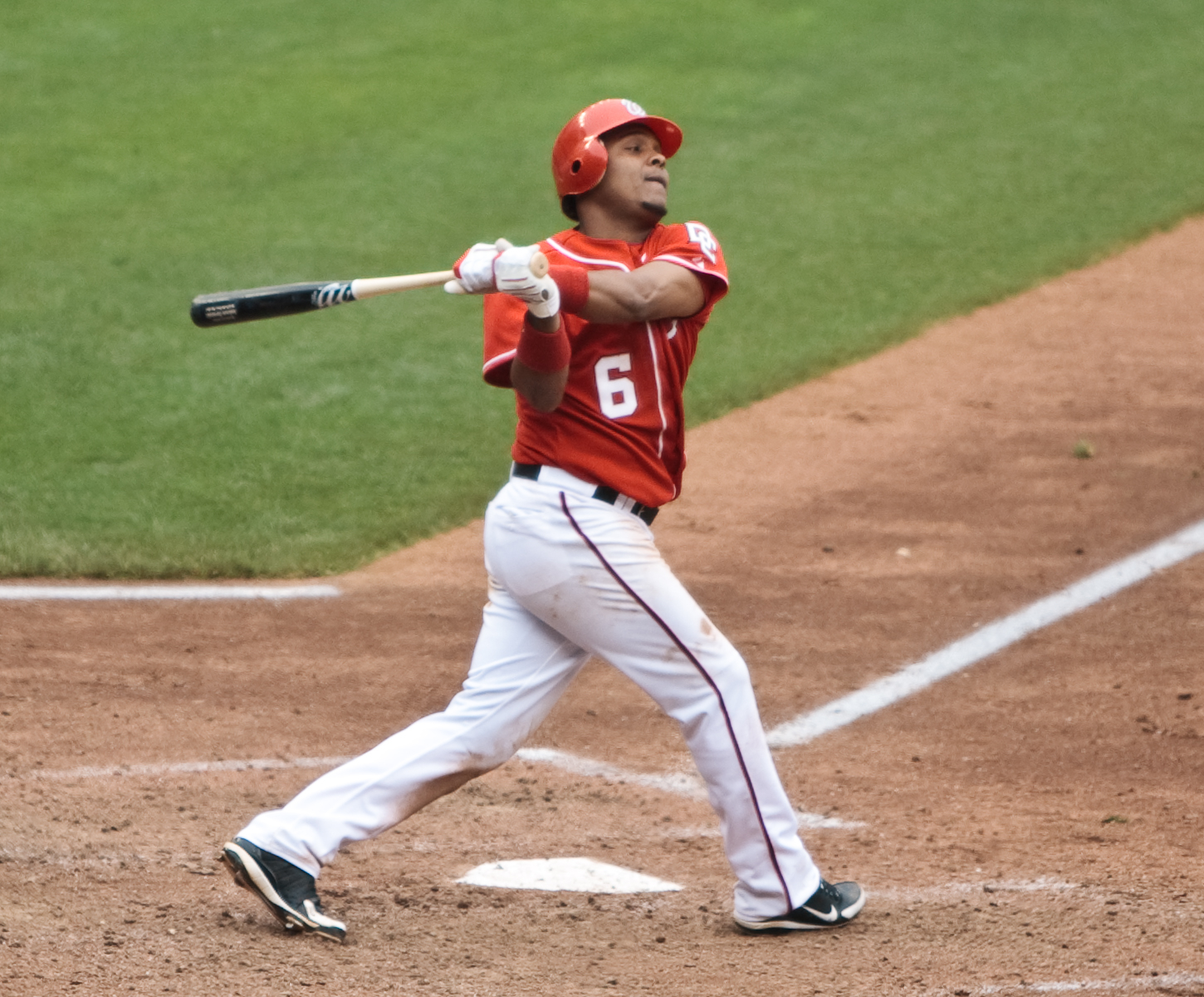 Anderson Hernández